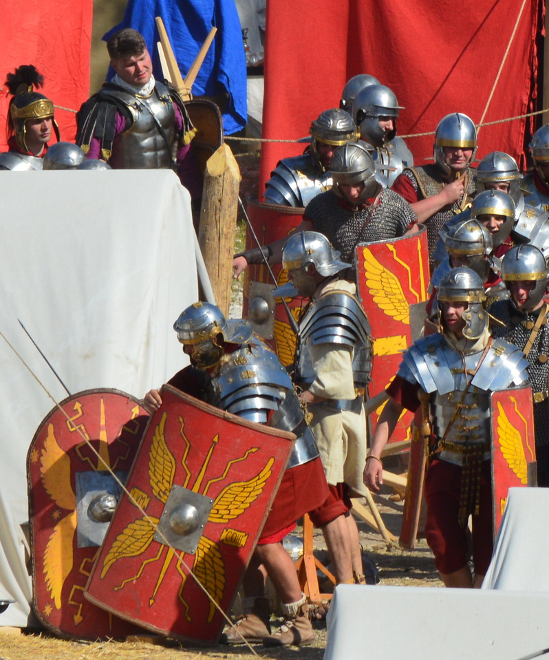 Фестиваль исторической реконструкции "Времена и эпохи" в Коломенском.